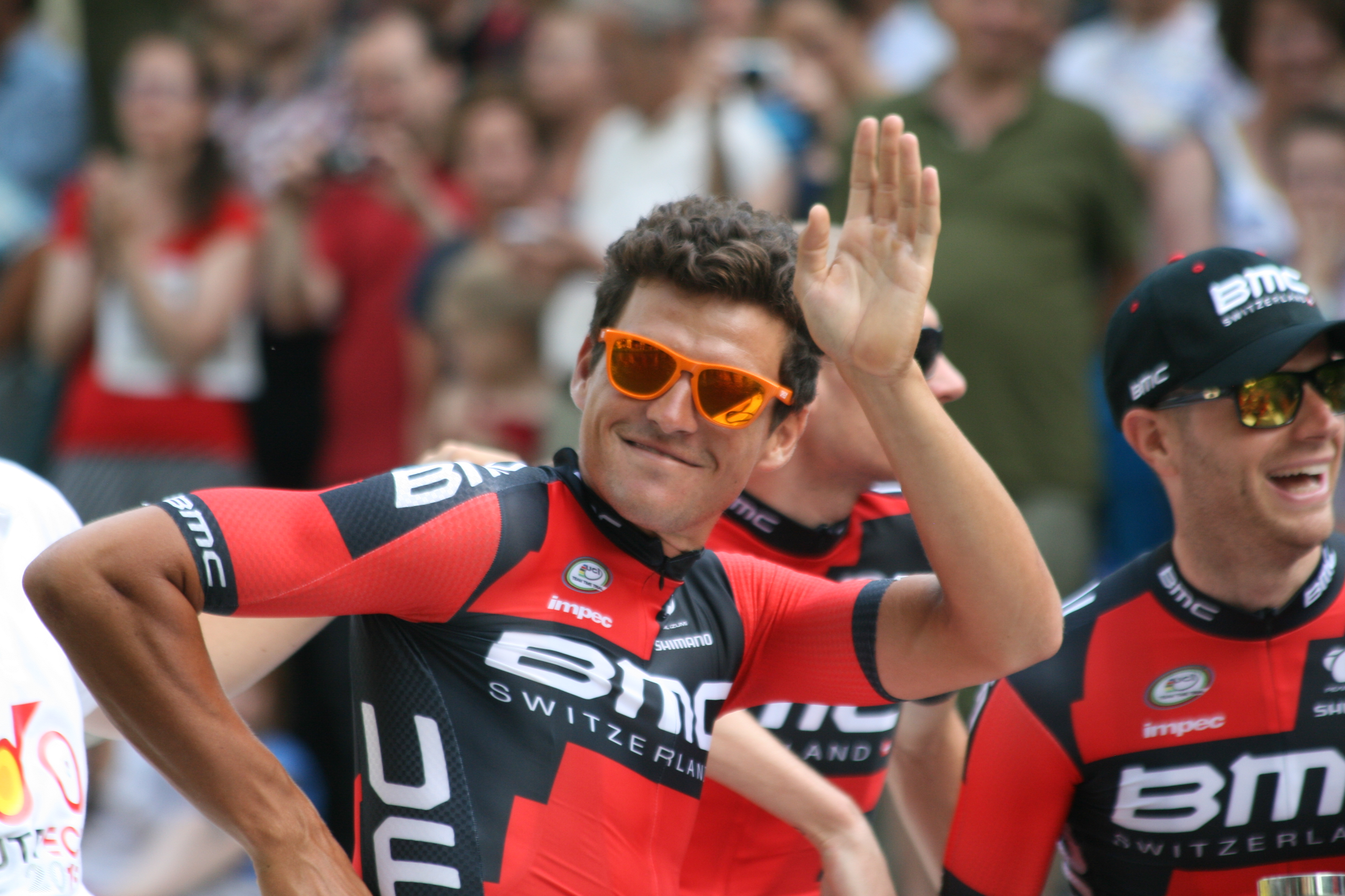 ploegenpresentatie Tour de France 2015 Utrecht